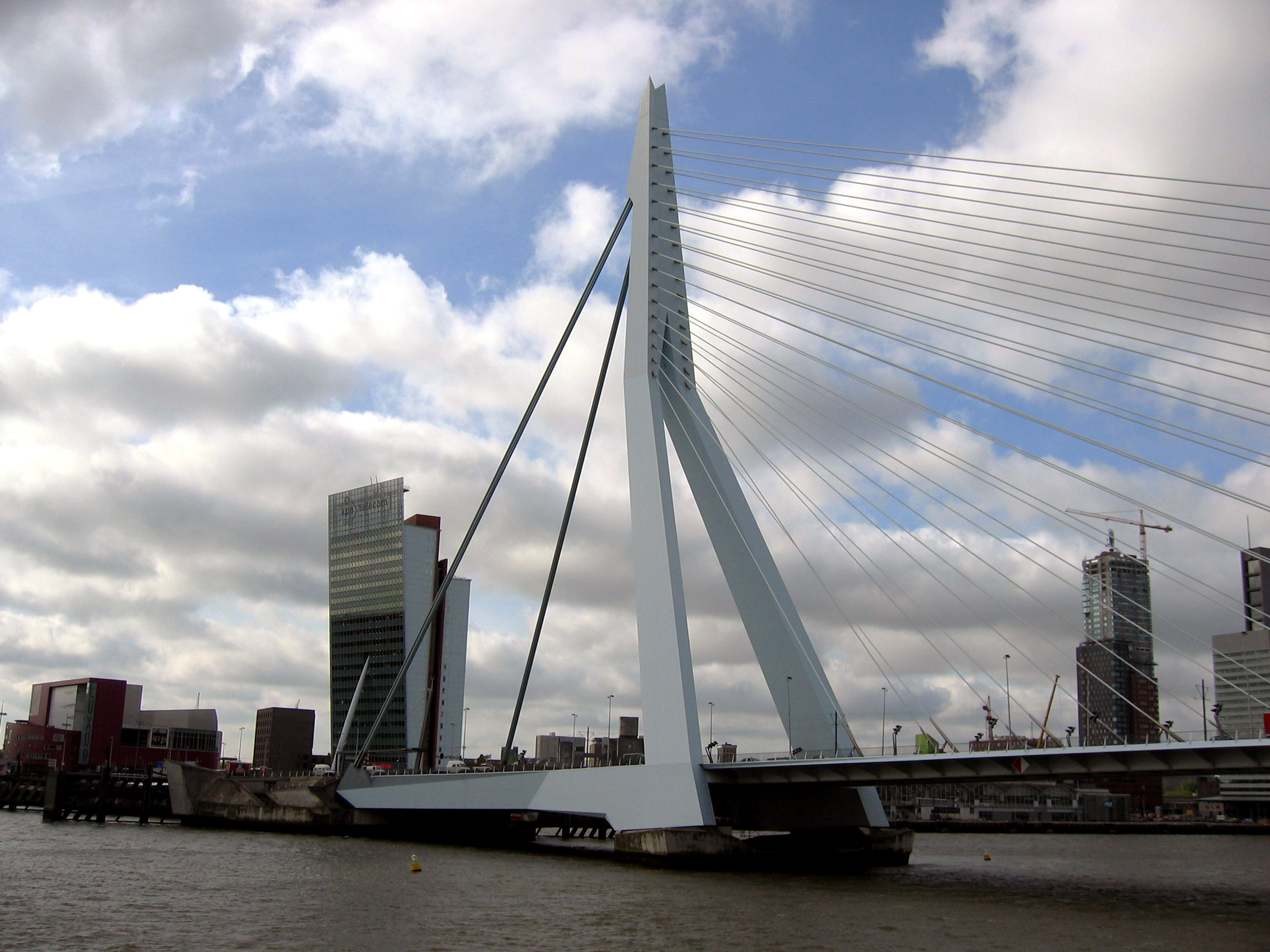 Erasmusbrug, Schrägseilbrücke in Rotterdam